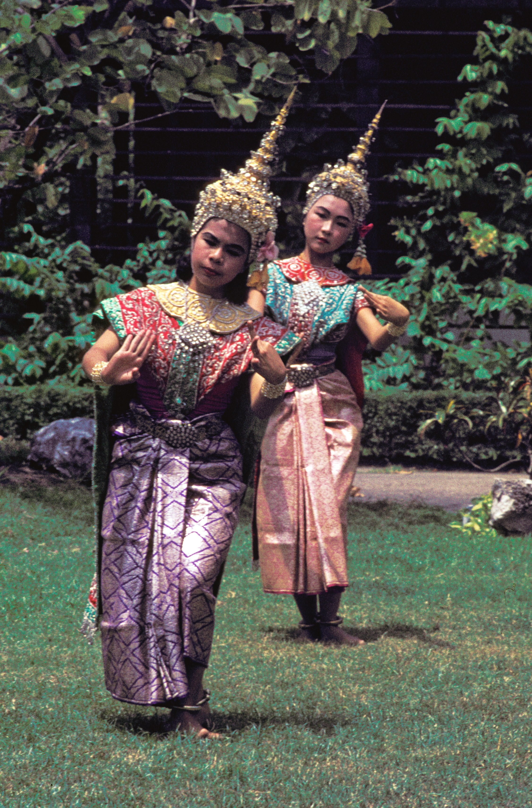 Bangkok, Thailand